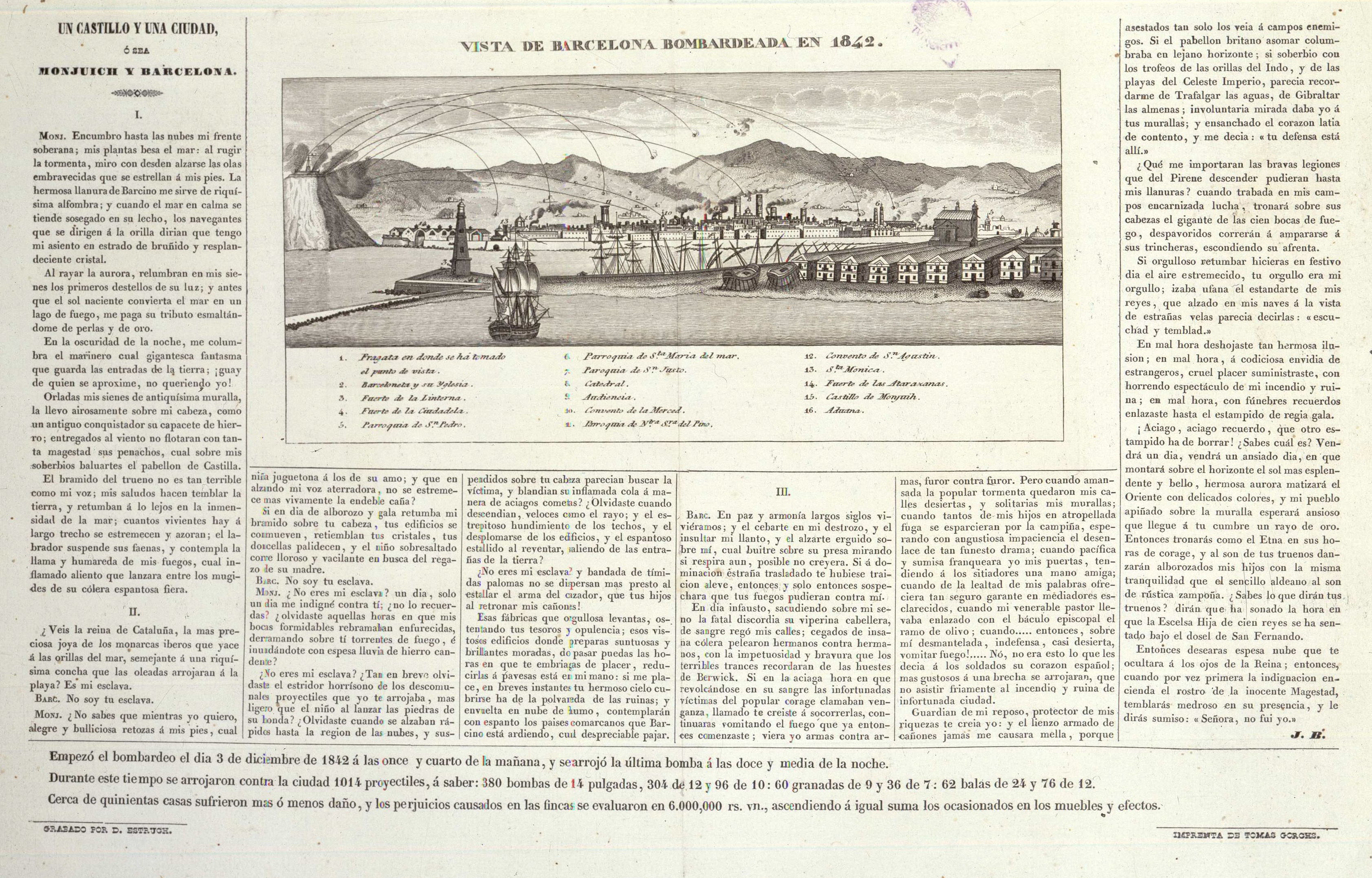 Vista de Barcelona bombardeada en 1842. Grabado de Domingo Estruch con la trayectoria de las bombas y un texto alrededor titulado "Un castillo y una ciudad, o sea Montjuich y Barcelona". Imprenta de Tomás Gorch. Biblioteca Nacional de España.